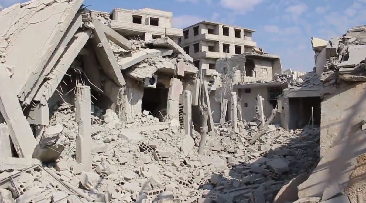 Ruines à Zamalka, dans la Ghouta orientale, en Syrie, le 22 février 2018.